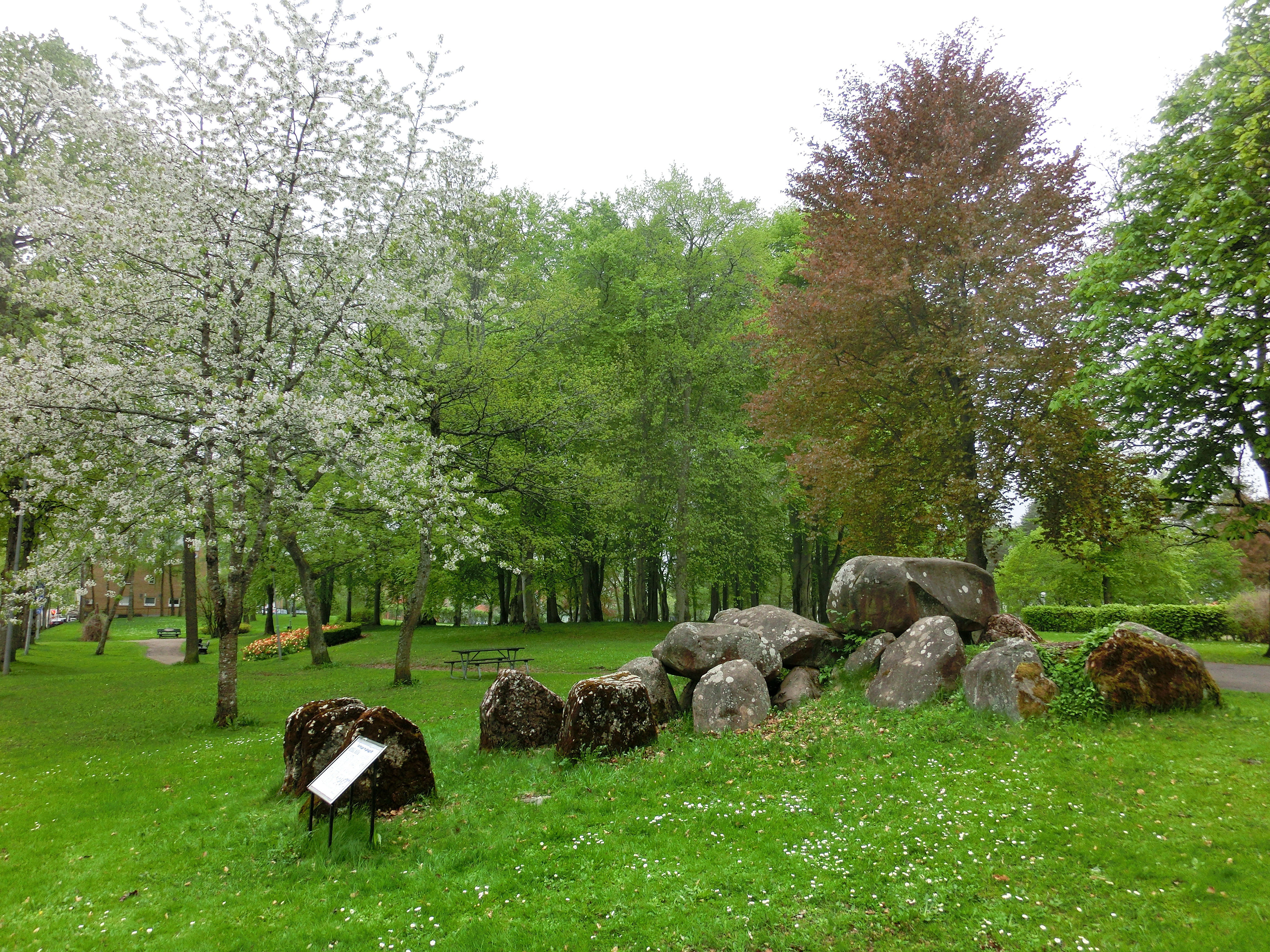 Gånggriften Kyrkerör (RAÄ-nr Falköping 28:1) i Planteringsförbundets park, Falköping, Falköpings kommun, f.d. Skaraborgs län, Västergötland, Västra Götalands län, Sverige.